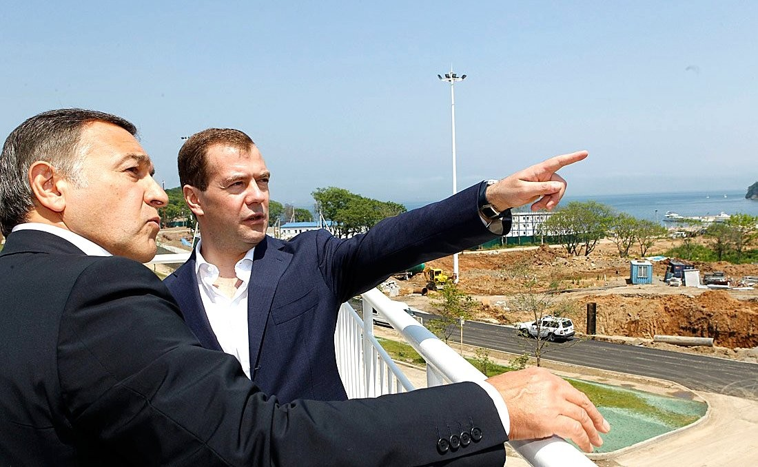 Арас Агаларов и Дмитрий Медведев